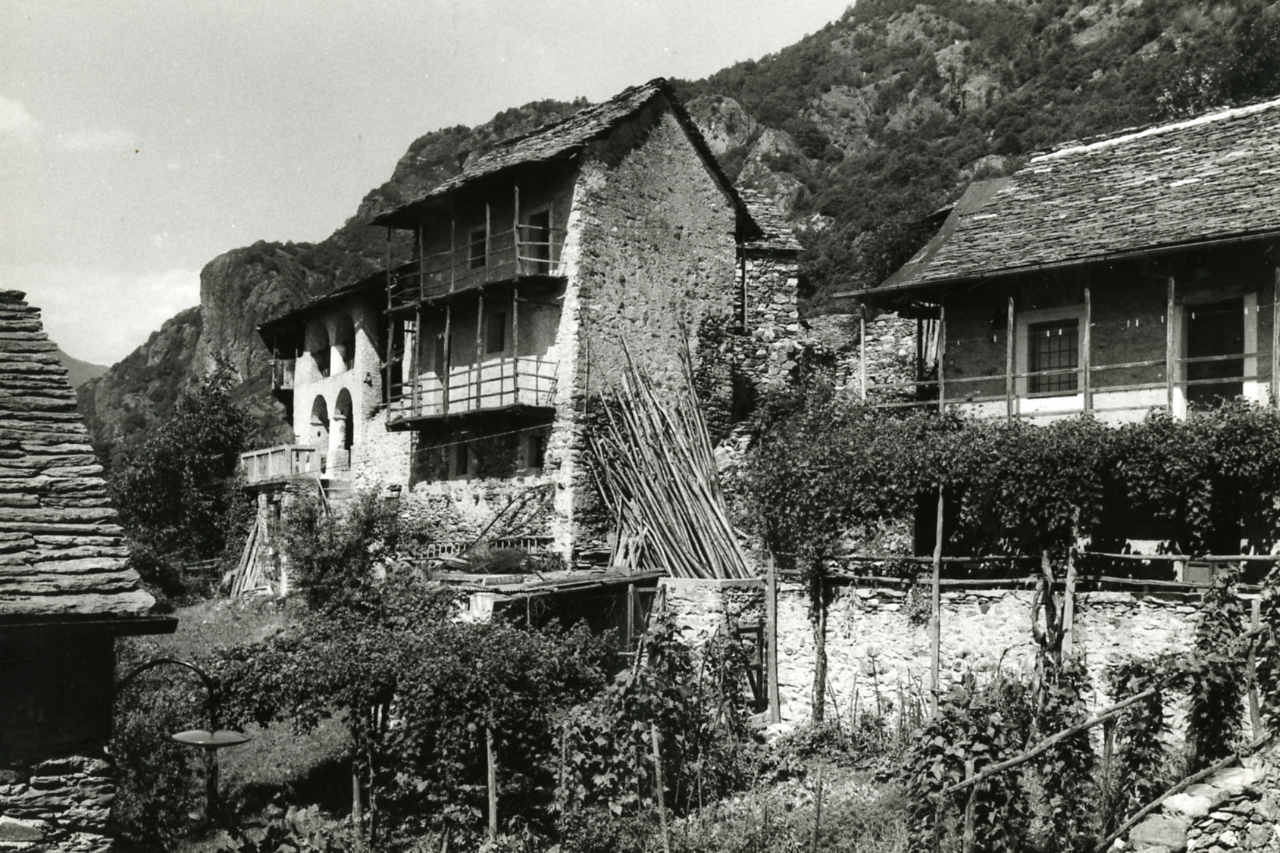 Servizio fotografico : Premosello-Chiovenda, 1982 / Paolo Monti. - Stampe: 8 : Positivo b/n, gelatina bromuro d'argento/ carta, 24x30. - ((Al verso delle stampe manoscritti i numeri dei negativi corrispondenti (formato 35 mm) con indicazione del fotogramma: 284/[tagliato], 287/[tagliato], 589/39, 589/69, 589//73, 590/24, 590/26; iscrizioni didascaliche con data manoscritta a matita: "Colloro 1982", "Colloro - Val d'Ossola/ Case rurali collinari"; timbro a inchiostro con copyright: "© Copyright/ Credit to/ Paolo Monti/ Corso Sempione [...]/ Milano". - Si tratta di ristampe, posteriori alla data di ripresa, realizzata negli anni 1966/05 e 1968/08, come datano i negativi corrispondenti. - Sul coperchio della scatola iscrizione didascalica manoscritta a pennarello nero: "Cusio Ossola". - Occasione: Documentazione per pubblicazione. - Fonte: Agenda di Paolo Monti: Nikon Leika 3001-/ Monti 1978 (1978-1982), presso Archivio Paolo Monti